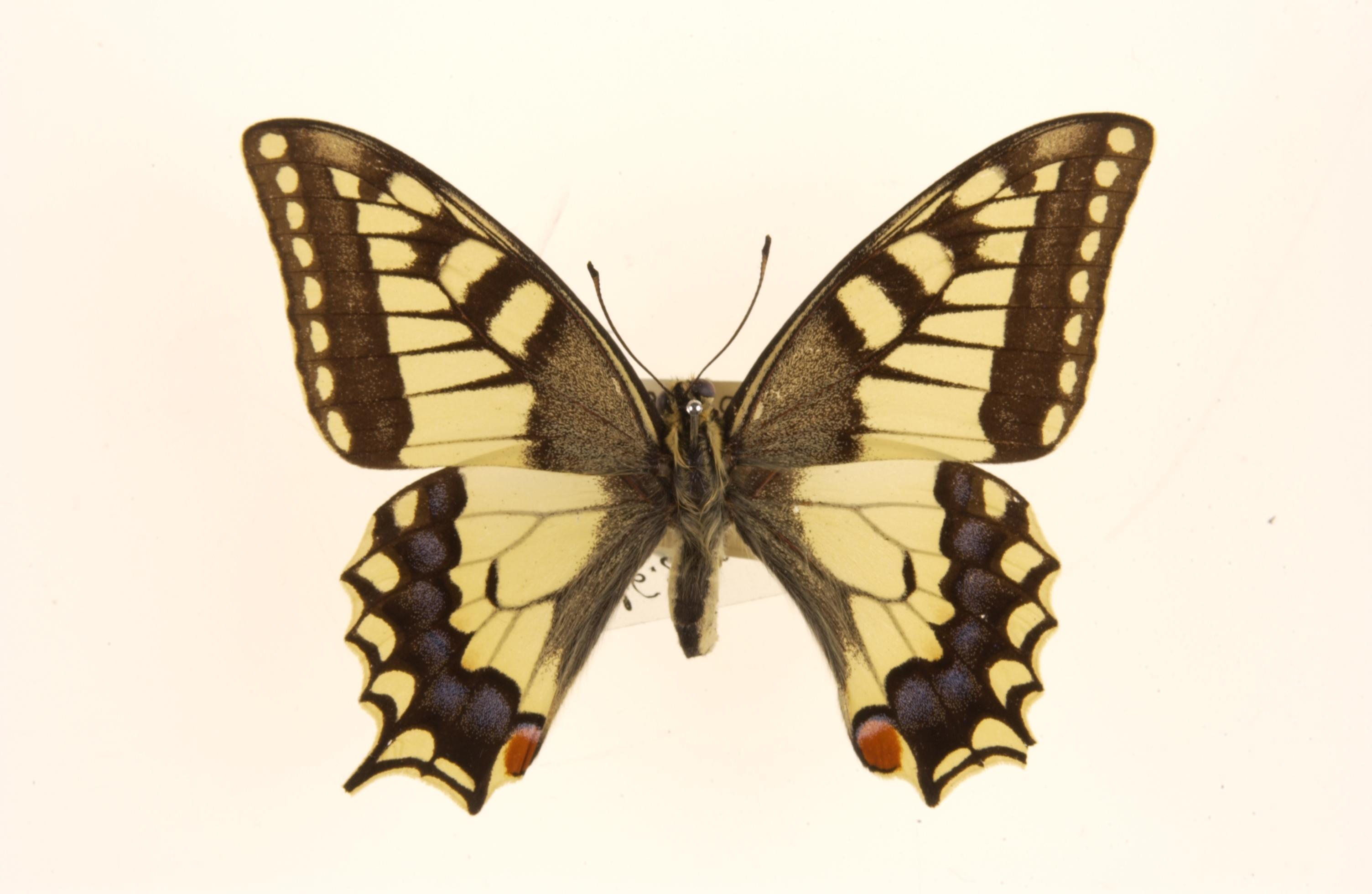 Papilio saharensis